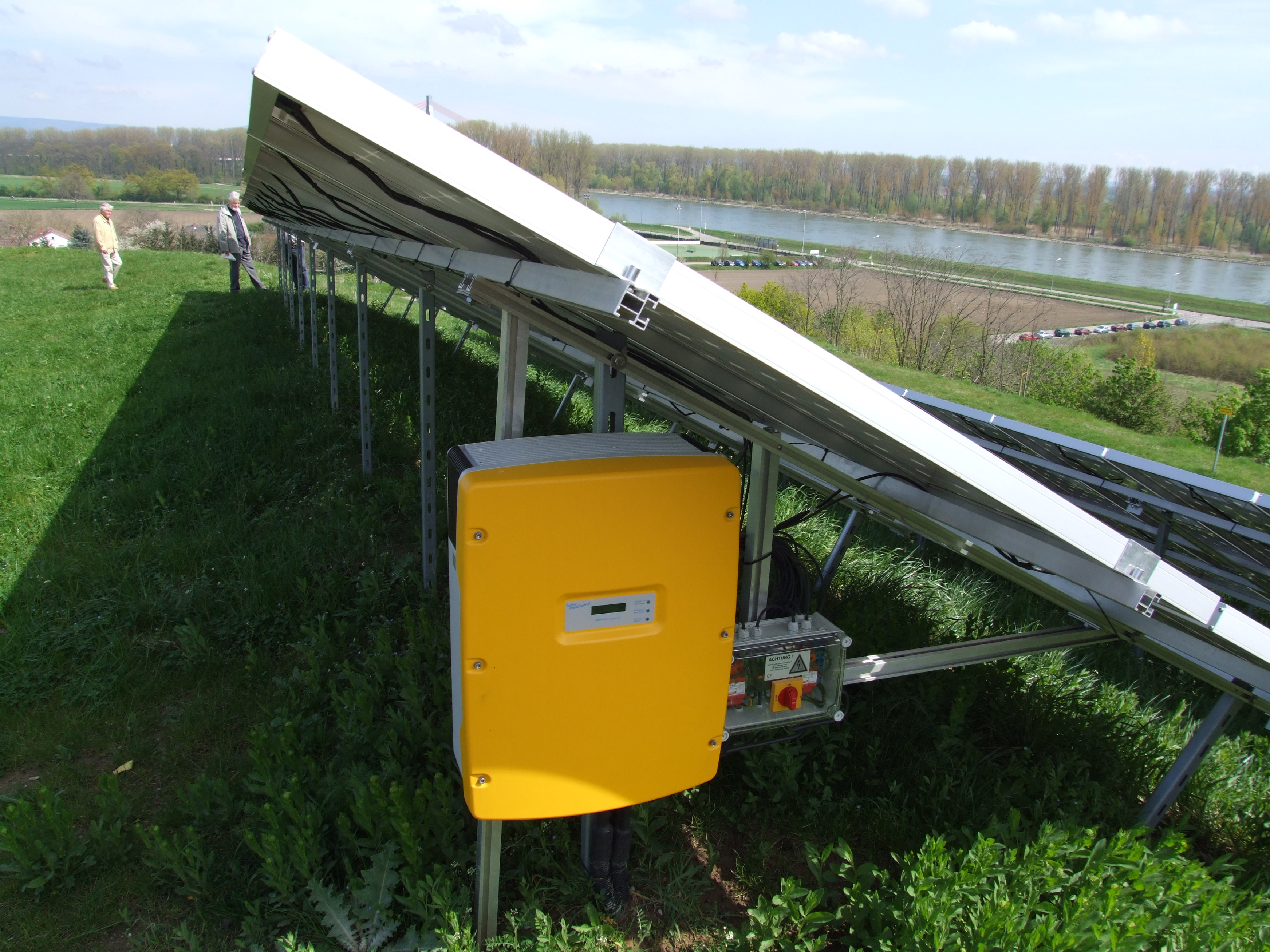 Müllberg Speyer: Solaranlage auf dem Osthang; hier ein Blick auf einen Wechselrichter der Firma SMA Solar Technology AG; im Hintergrund der Rhein